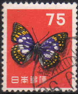 日本の国蝶オオムラサキを描く75円切手の使用済。